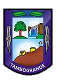 Escudo Tambogrande